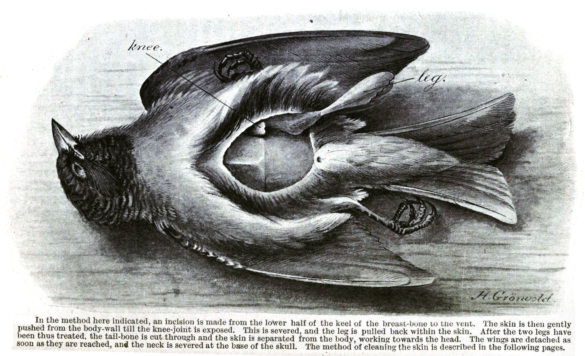 partly skinned bird